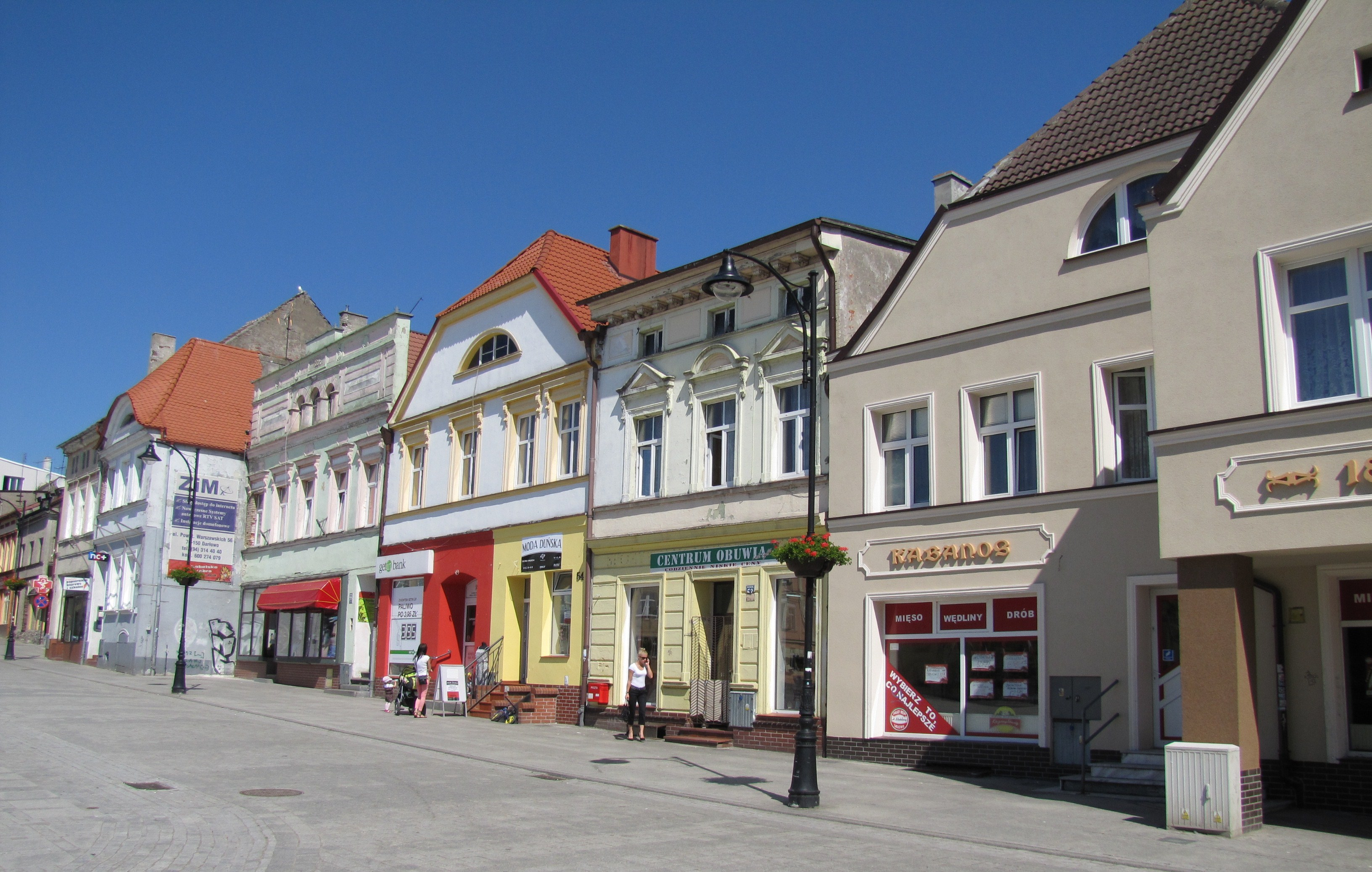 Kamienice Starego Miasta.